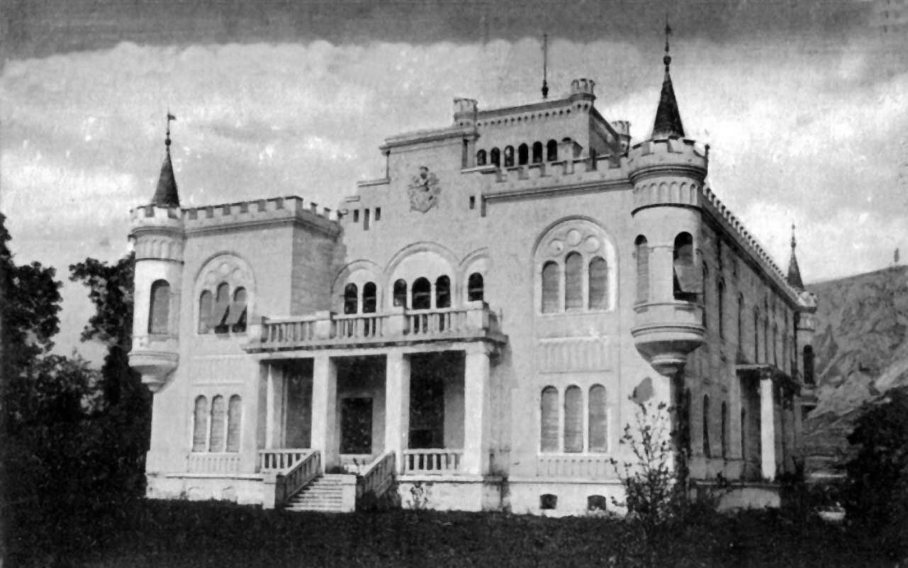 Colţeşti, conacul Thoroczkai-Rudnyánszky din secolul al XIX-lea.